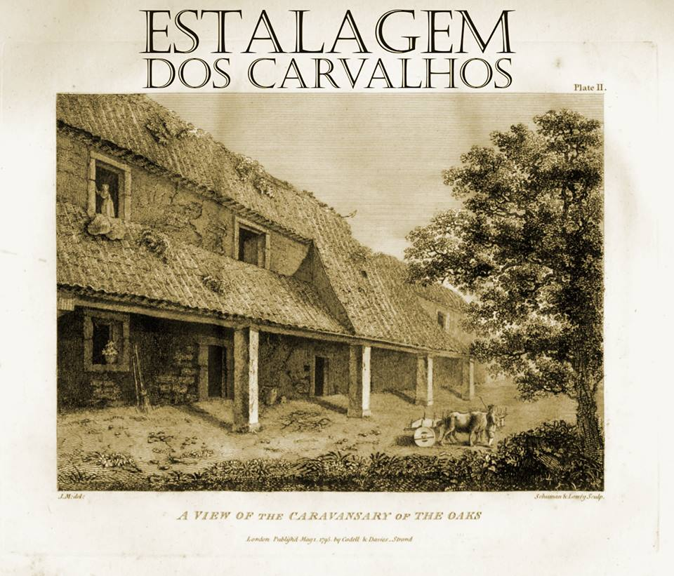 Gravura da Estalagem dos Carvalhos, Vila Nova de Gaia, Portugal